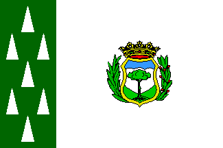 Bandera de Cercedilla, en Madrid (España)